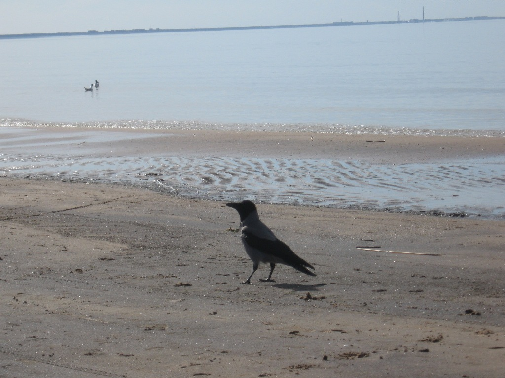 Vares Narva lahe rannikul Narva-Jõesuus. Tagaplaanil on Sillamäe.